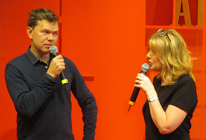 Aron Etzler (partisekreterare i Vänsterpartiet) och Åsa Linderborg (kulturchef på Aftonbladet) i Aftonbladets monter på Bokmässan 2014.